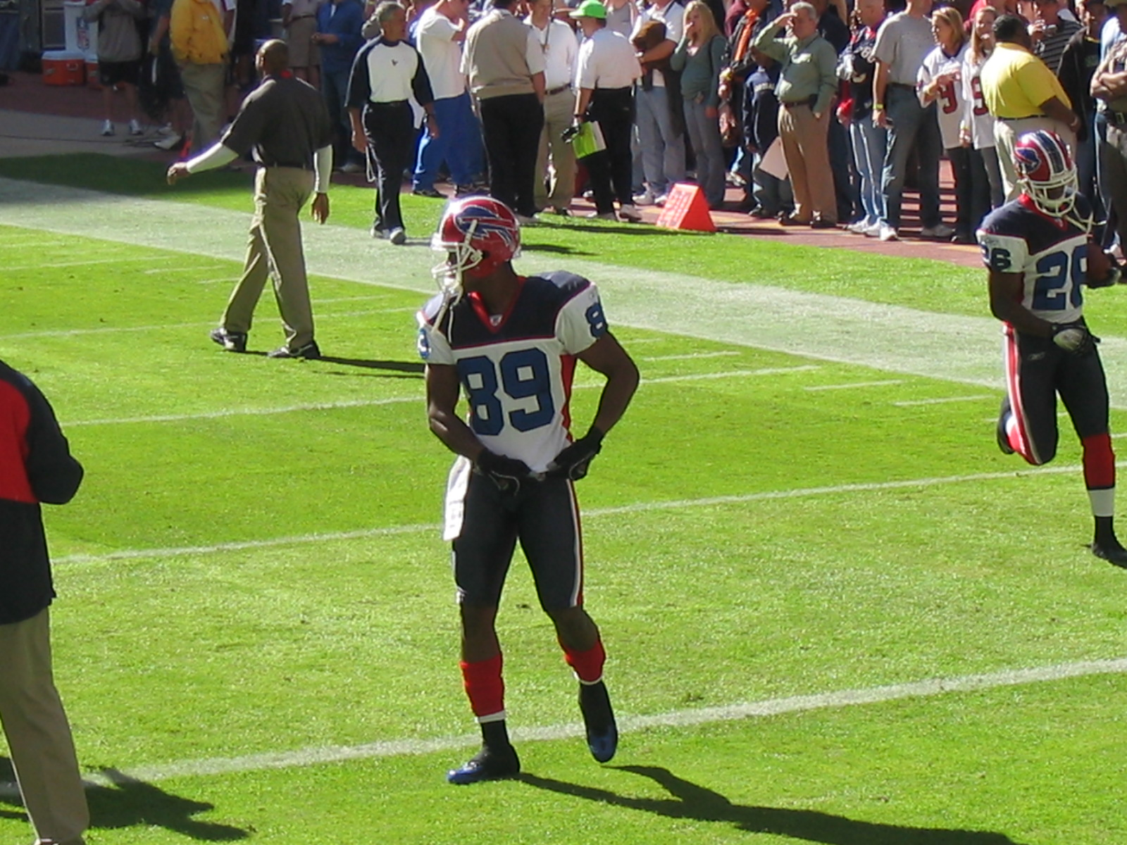 Sam Aiken in November 2006.